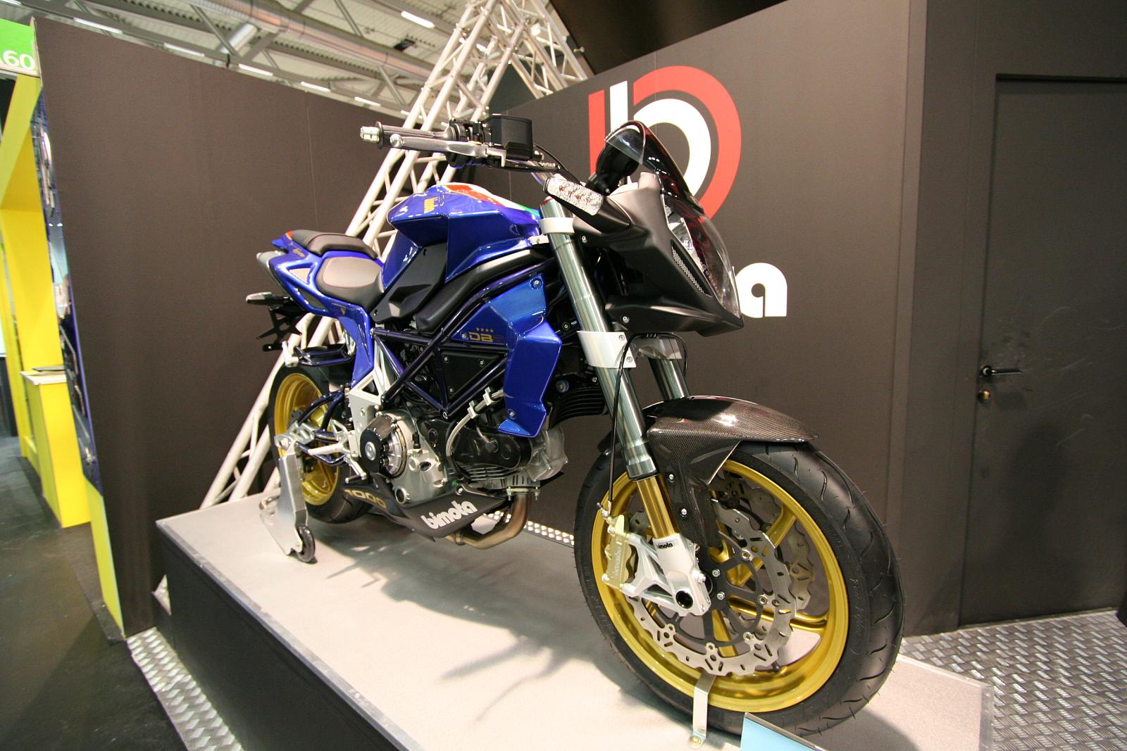 Bimota DB6 Delirio Azzuro Limited Edition